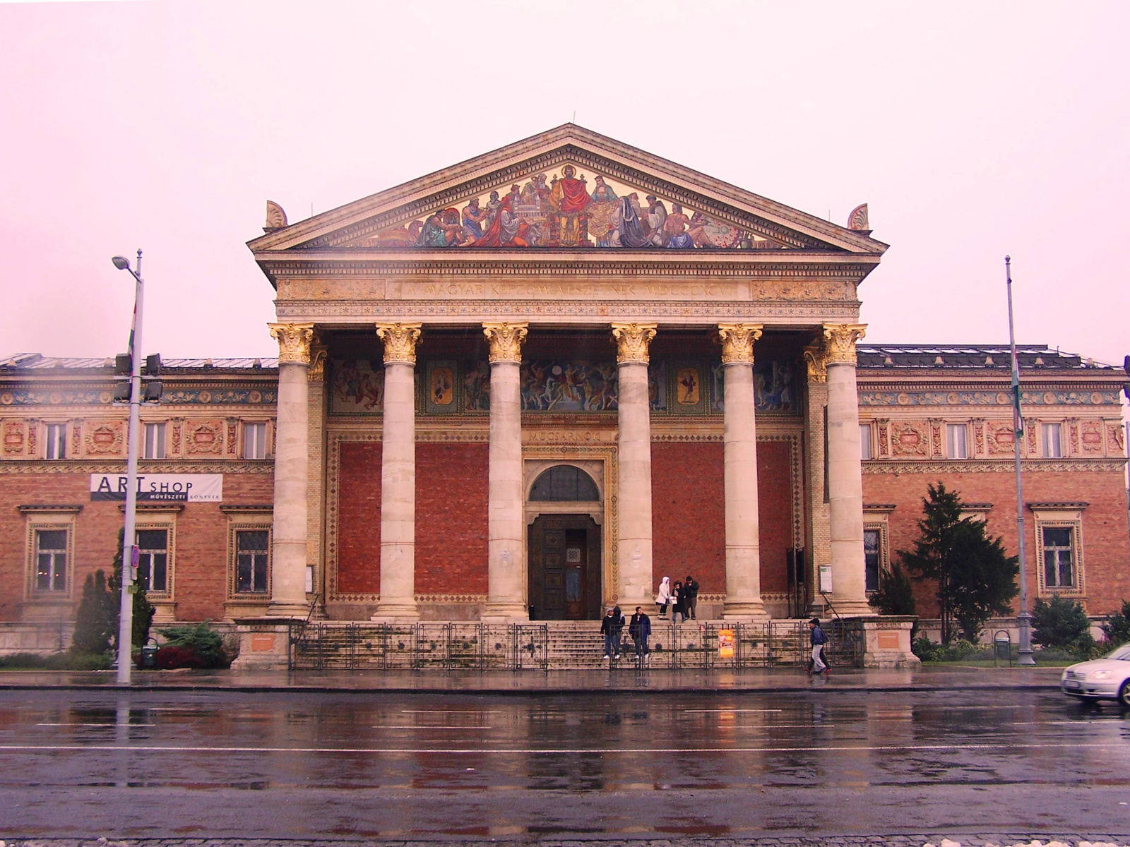 Műcsarnok (Budapest 14, Hősök tere, Olof Palme sétány 1., Dózsa György út 37.) This is a photo of a monument in Hungary. Identifier: 1227